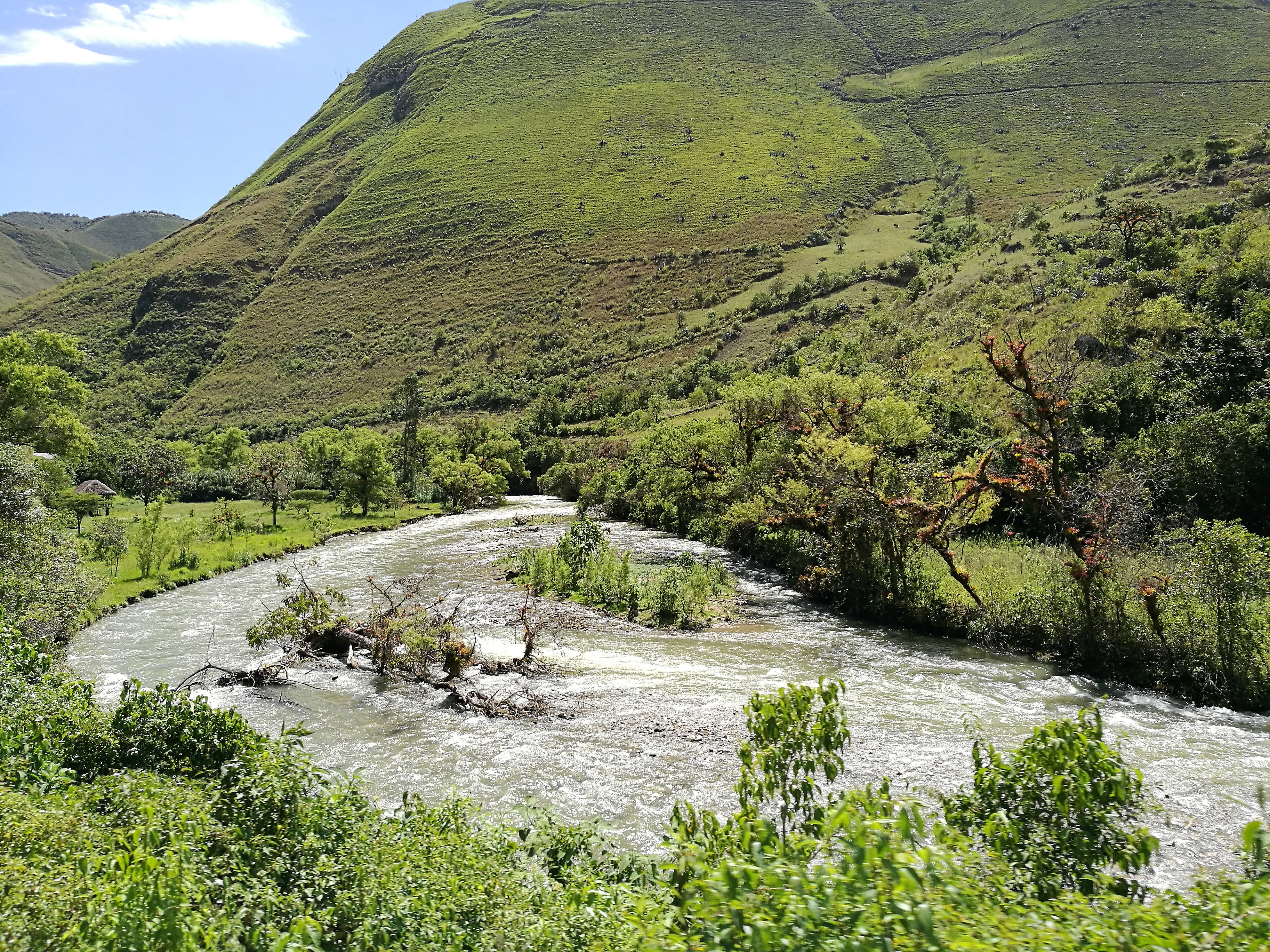 Riu Utcubamba al districte de Montevideo, Província de Chachapoyas